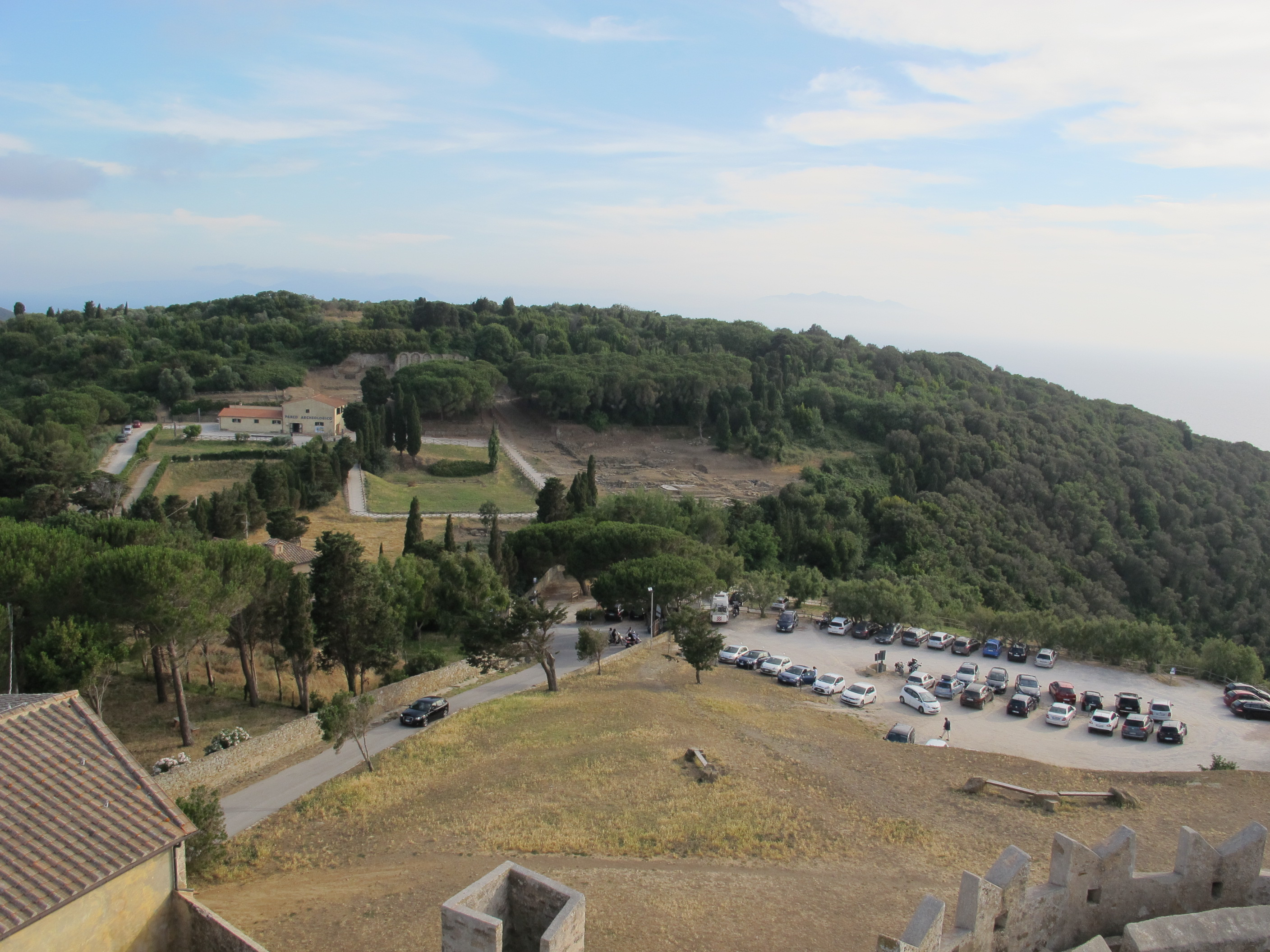 Populonia, veduta scavi 2